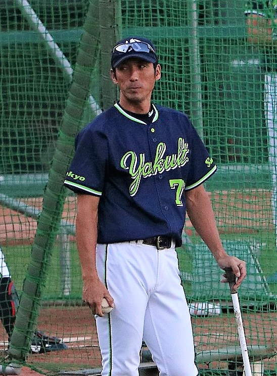 2017/9/28マツダスタジアム